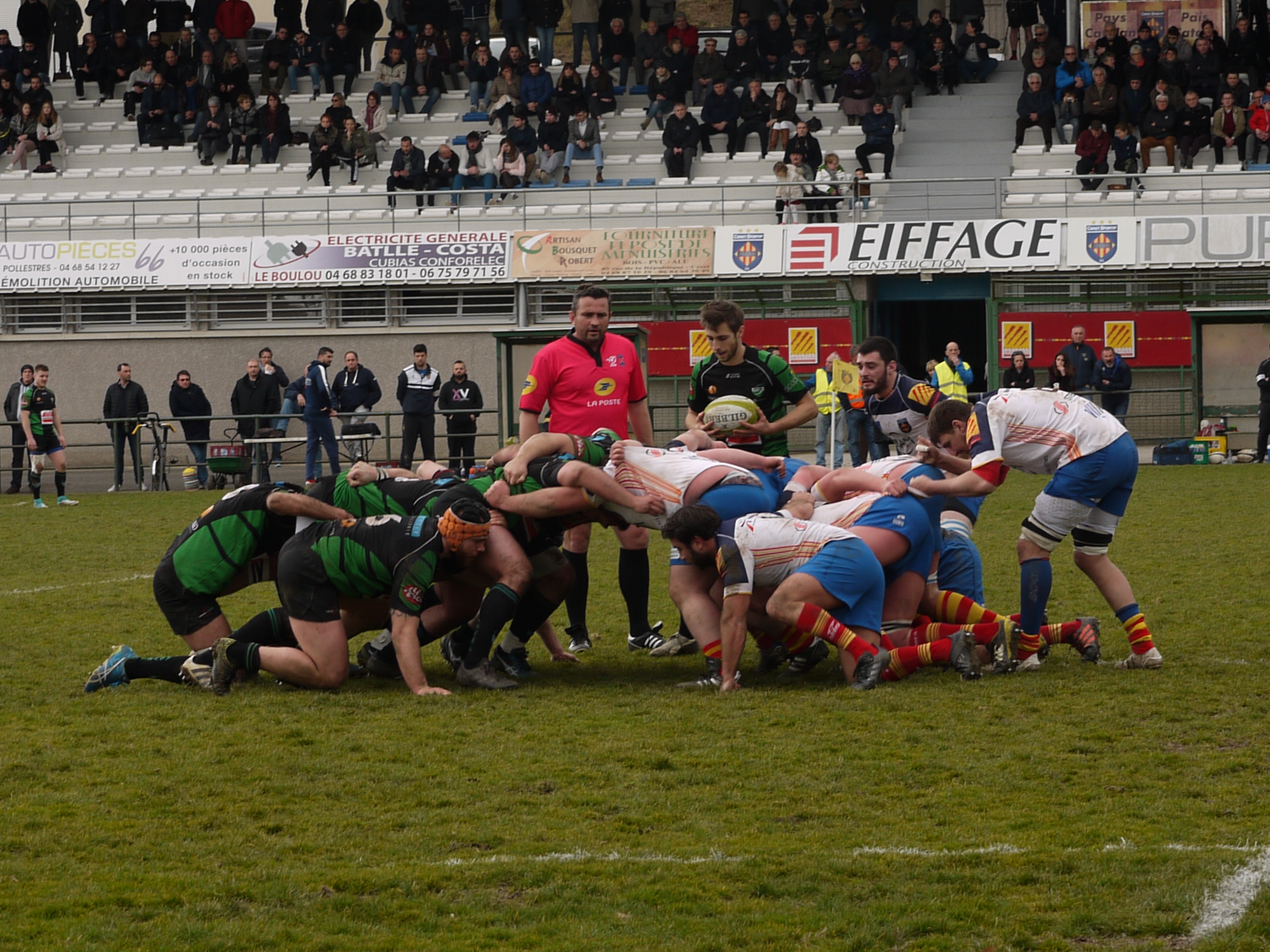 Match Céret sportif vs AS Villeurbanne à Céret le 4 mars 2018.